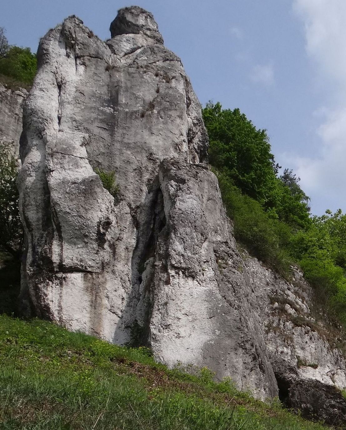 Turnia z Krokiem w Dolinie Kobylańskiej